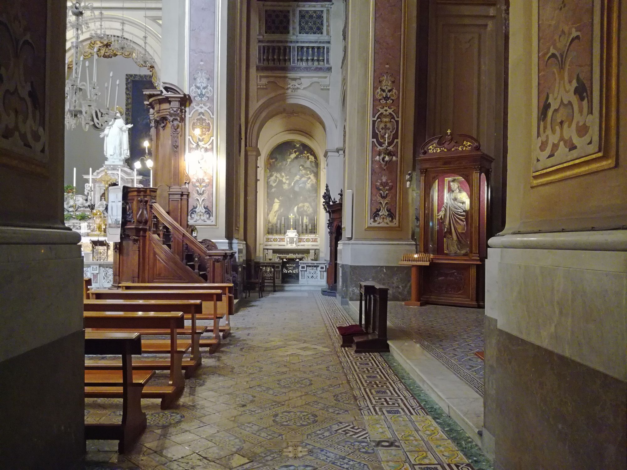 Teresa a Chiaia